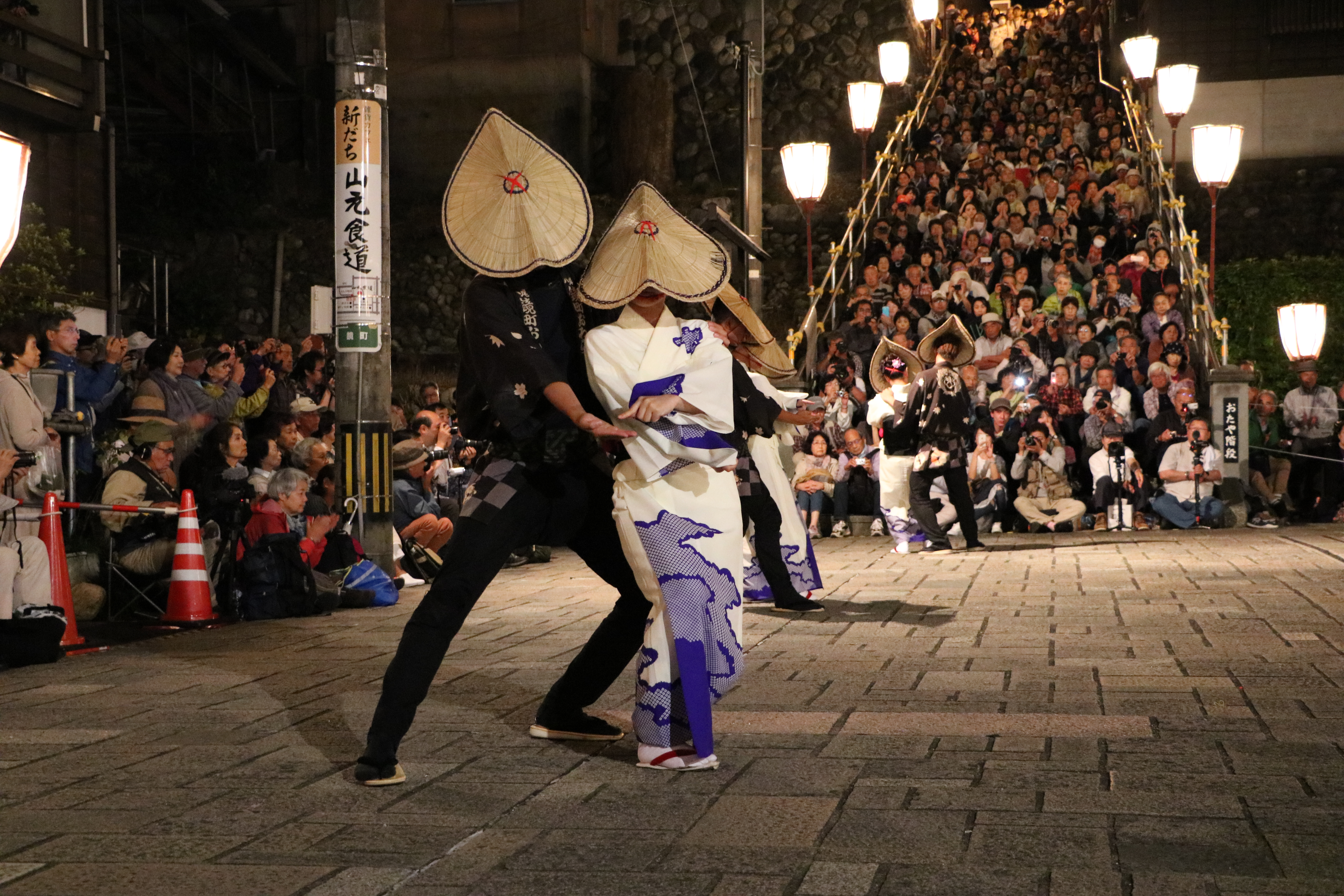 おわら風の盆 鏡町支部 2017年9月３日。（富山県富山市八尾町）